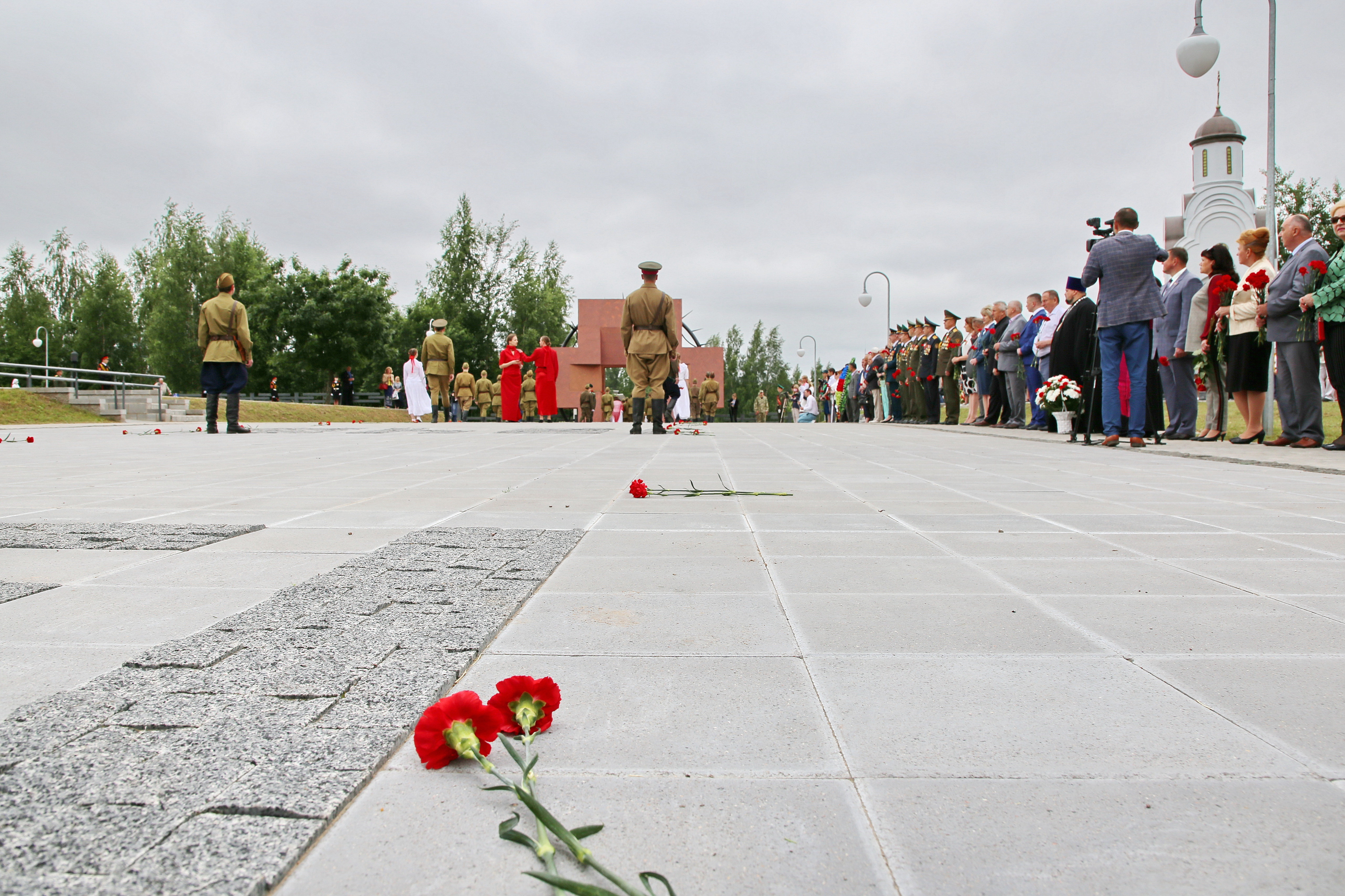 Гвоздики на земле